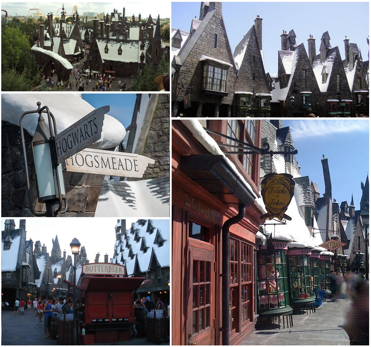 Montage photo de Pré-au-Lard (The Wizarding World of Harry Potter)